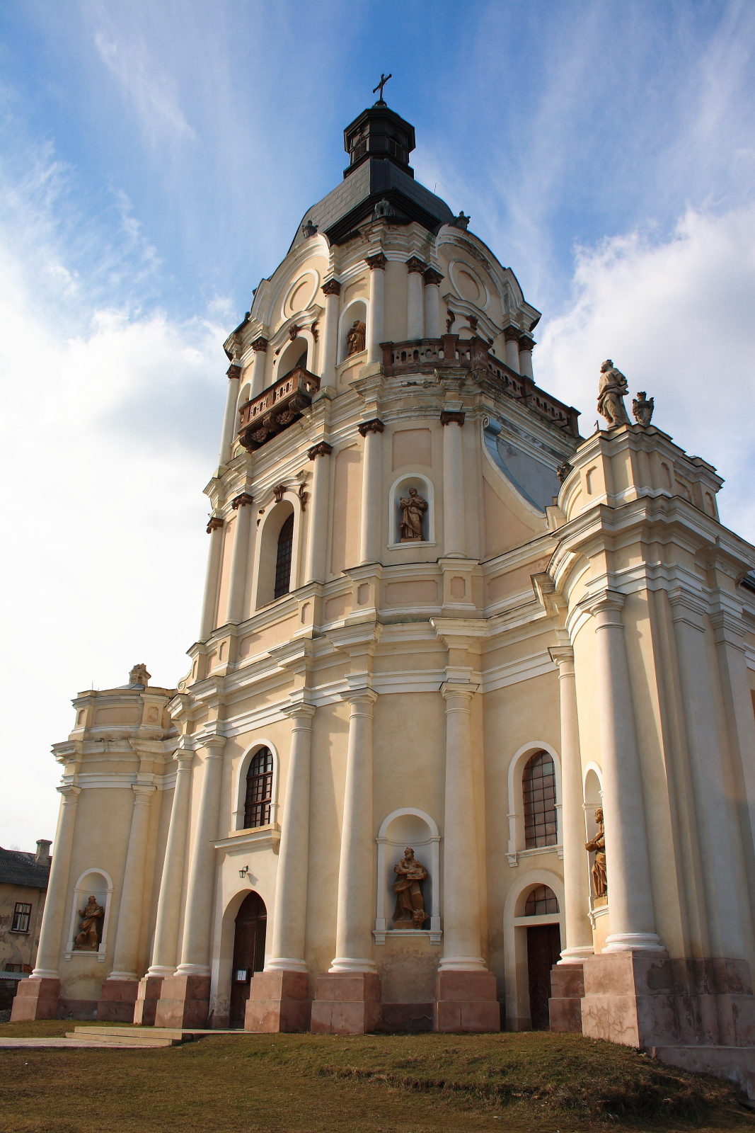 Микулинці